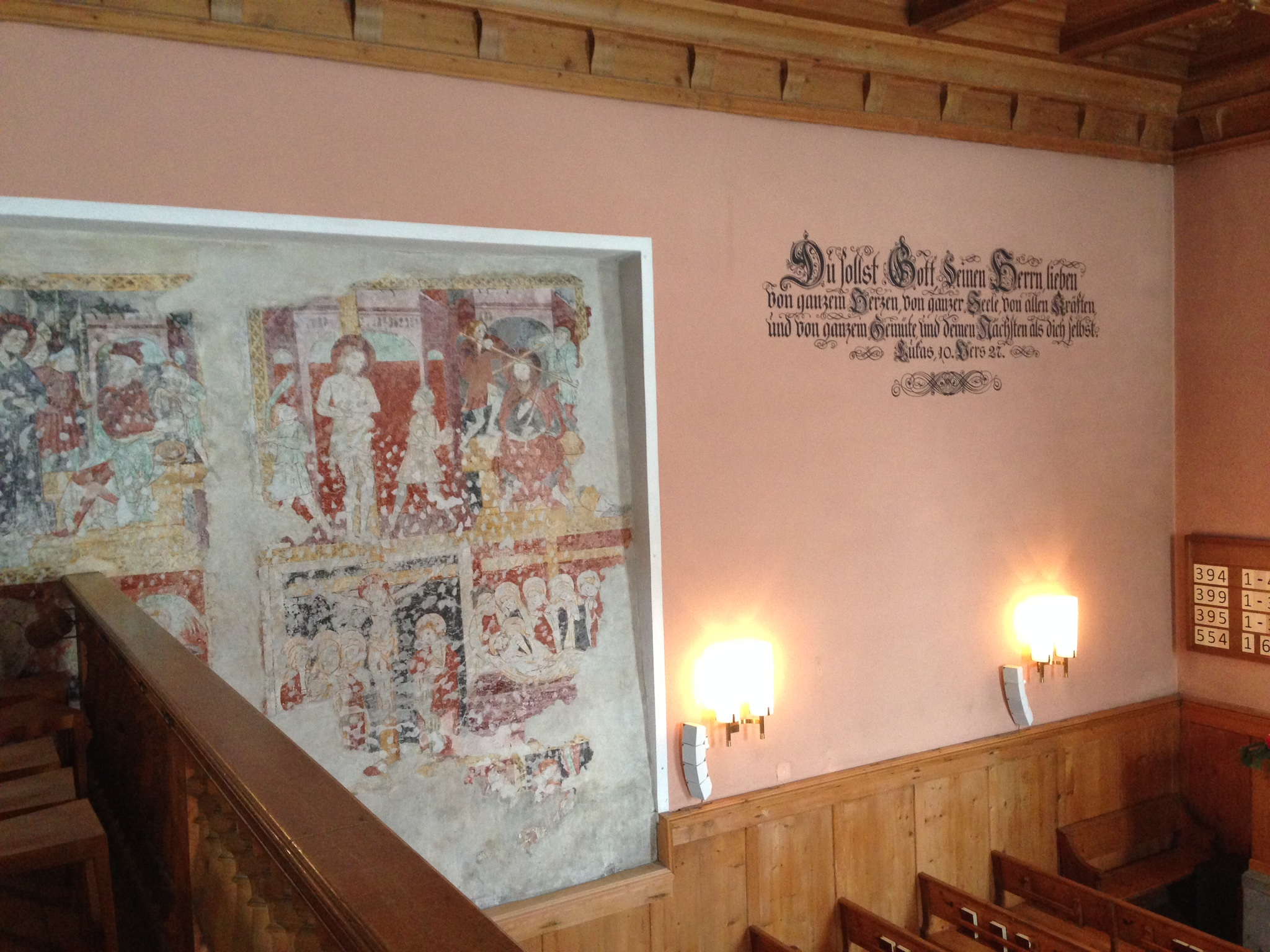 Fresken an der Seitenwand in der reformierten Kirche Igis GR